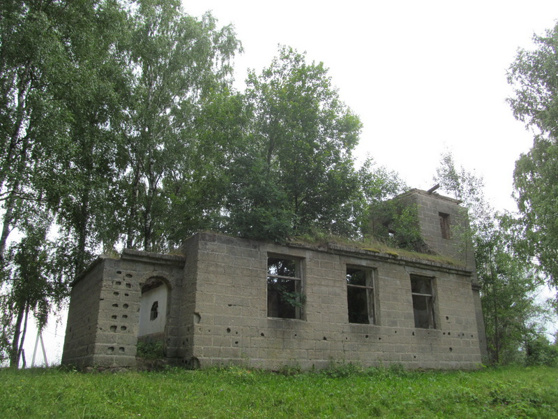 Юшкавічы. Касцёл